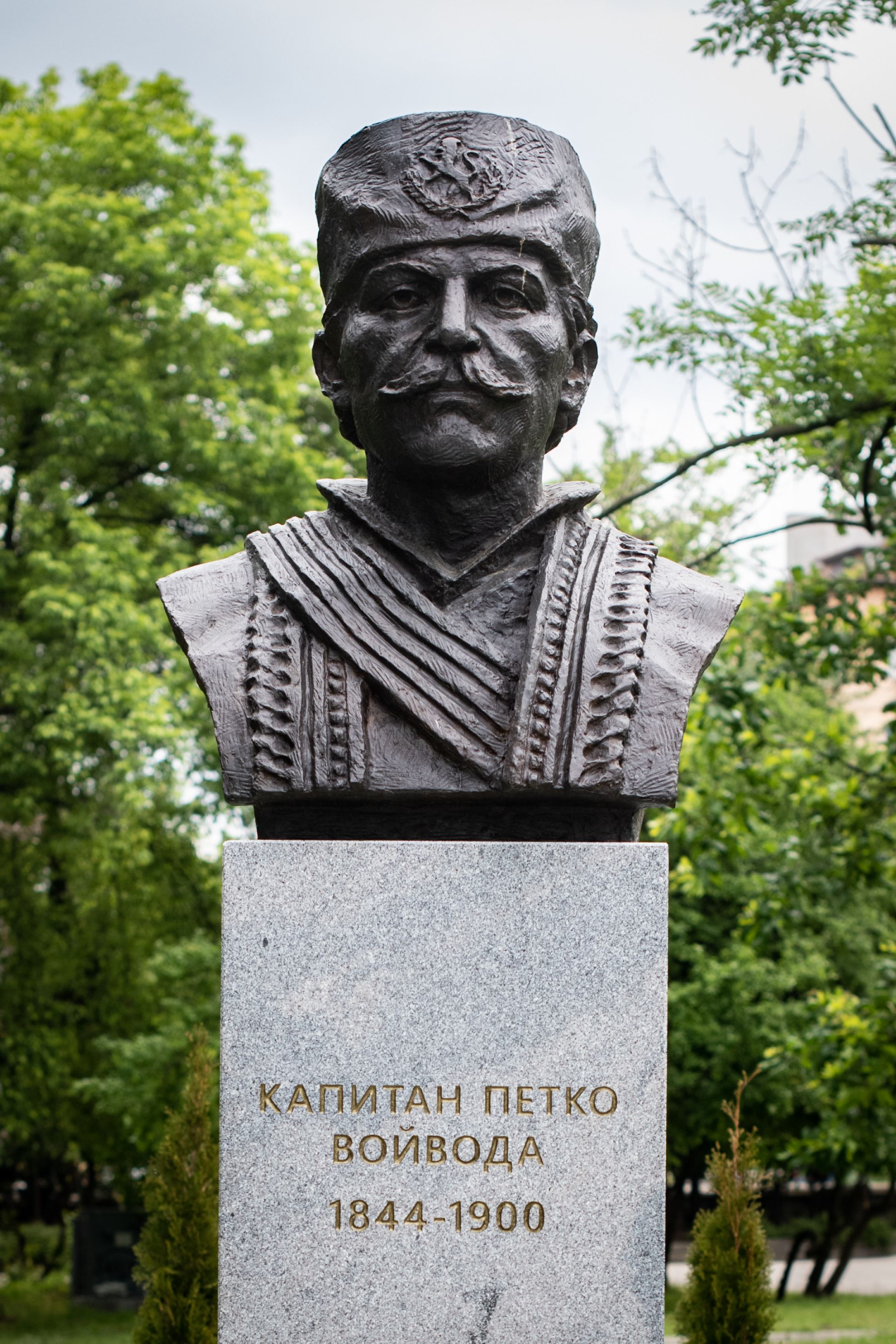 Паметник на Петко войвода в парк "Борисова Градина"